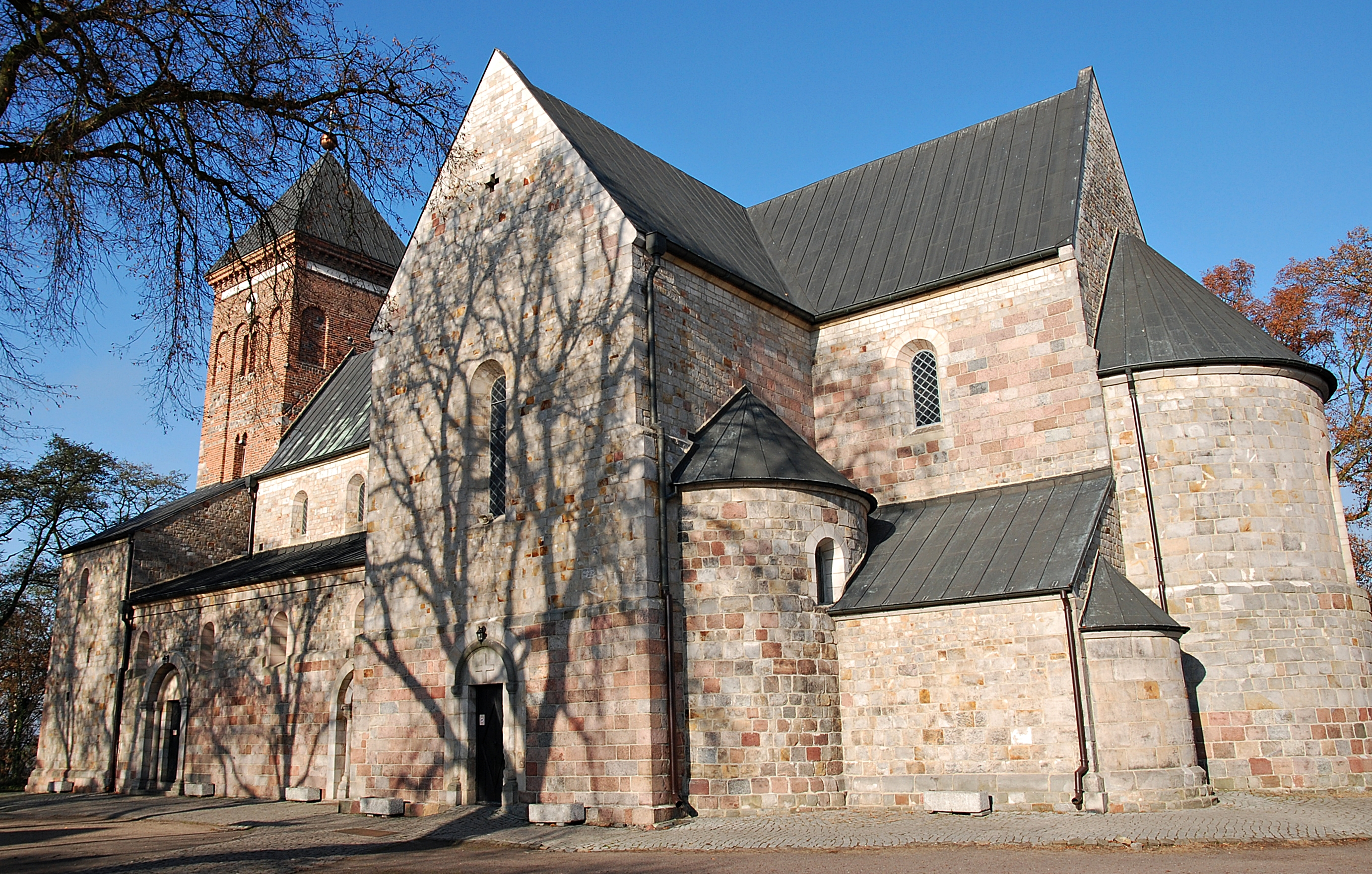 Kolegiata w Kruszwicy